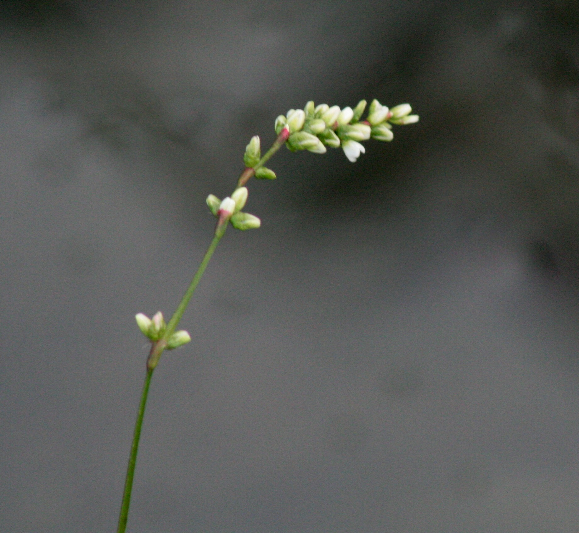 Persicaria_mitis (Polygonum mite) - Persicaria mite Località Canizzano (TV), quota 10 m s.l.m.